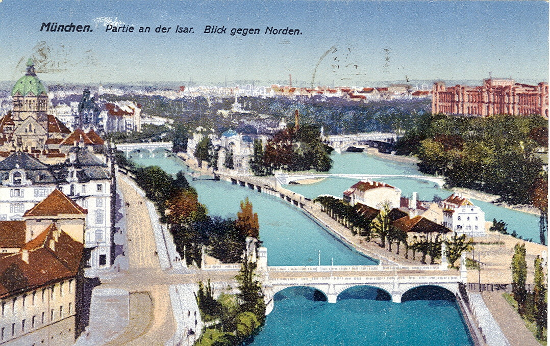 Postkarte, datiert 3.3.1918. Beschriftung: " München - Partie an der Isar. Blick gegen Norden", im Vordergrund die Innere Ludwigsbrücke (über die linksseitige, Große Isar).